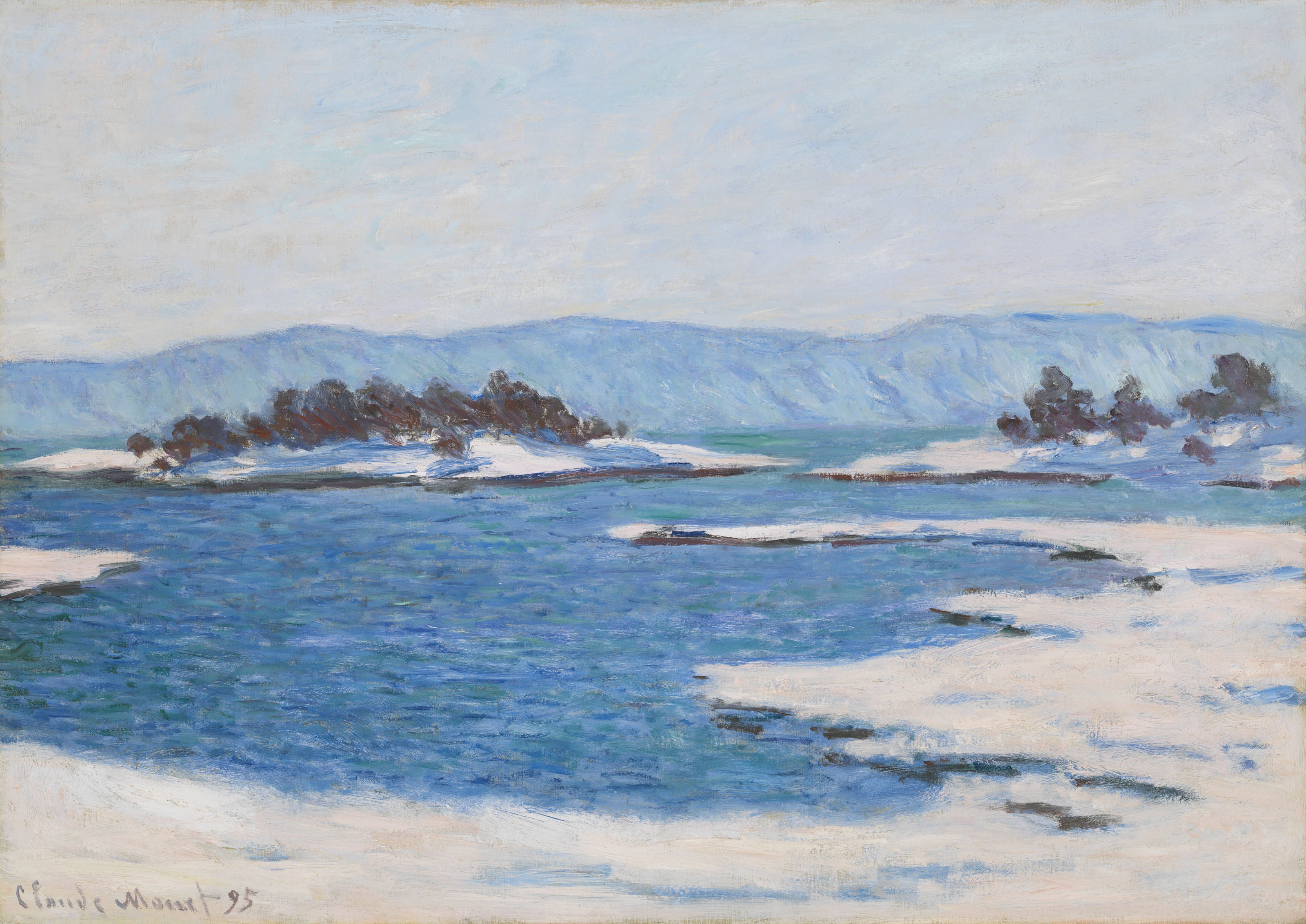 Oslofjorden